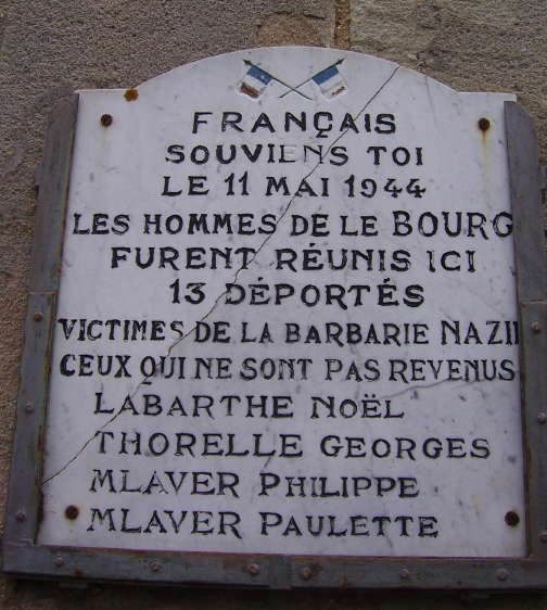 Plaque commémorative des exactions de la 2ème Division SS Das Reich du 11 mai 1944 : 13 déportés, 4 ne sont pas revenus. Apposée sur l'église du Bourg.